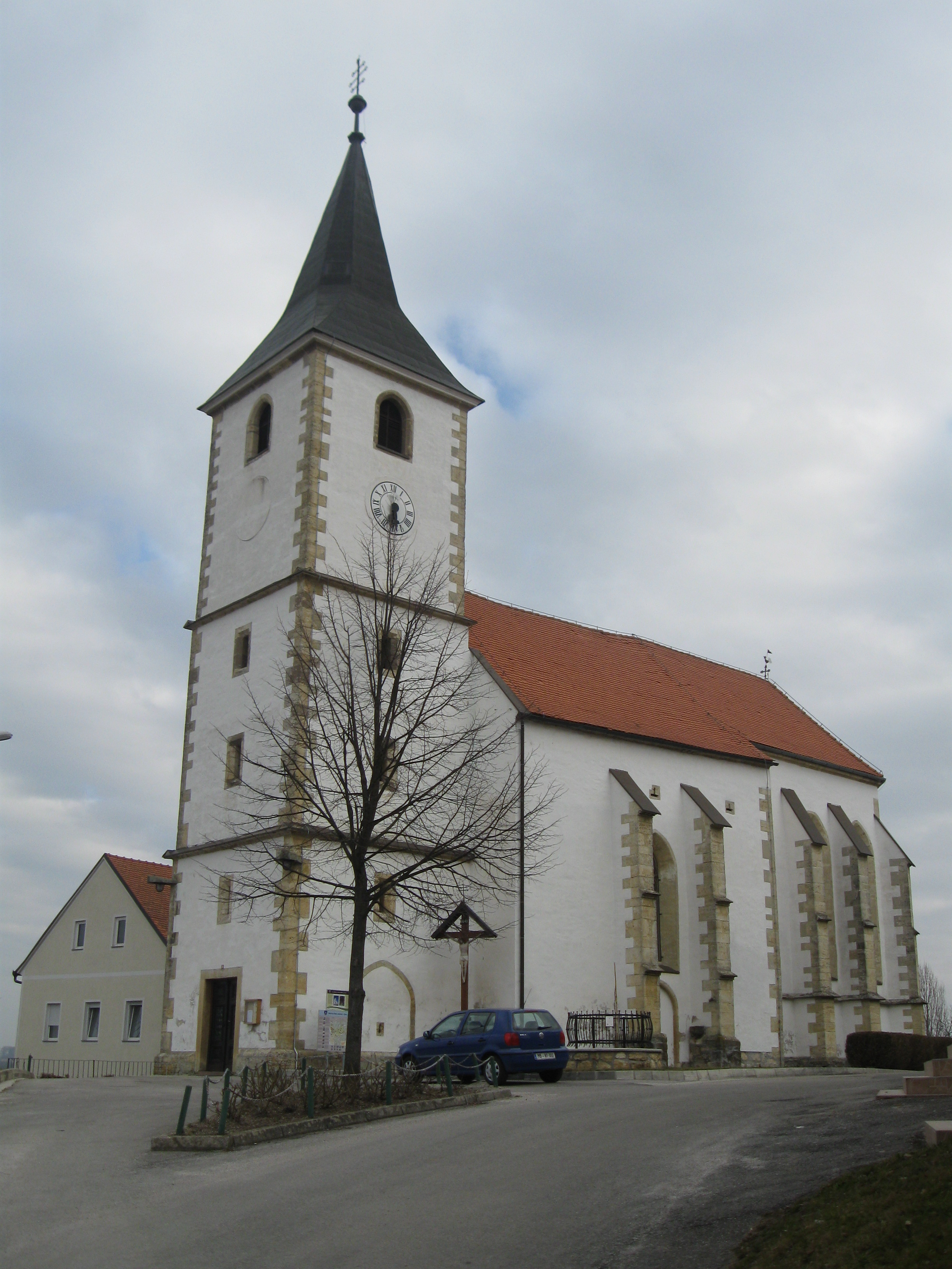 Cerkev Sv. Andreja v Vitomarcih v občini Sv. Andraž v Slovenskih goricah.